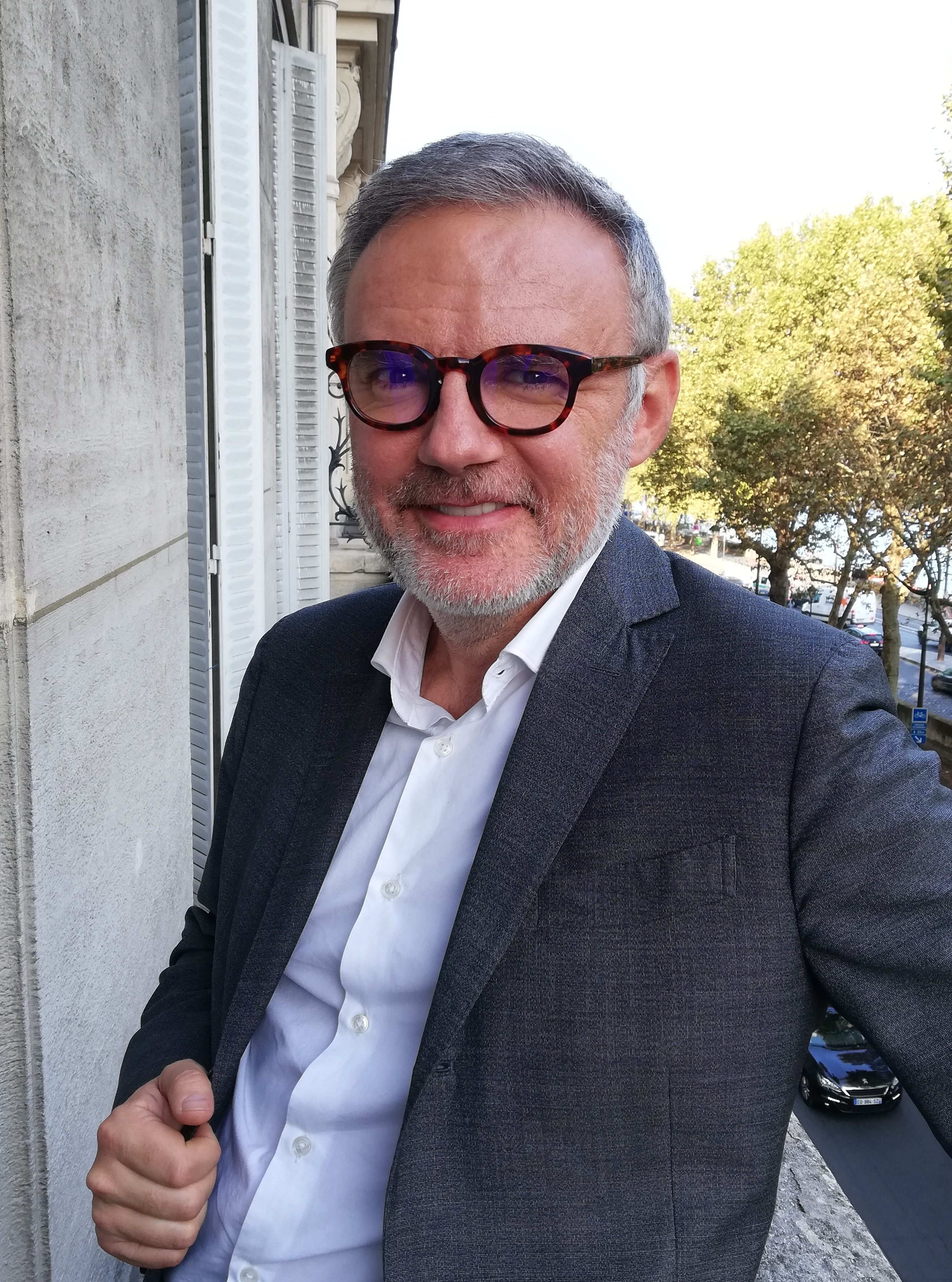 Éric Brunet au bord de la Seine à Paris